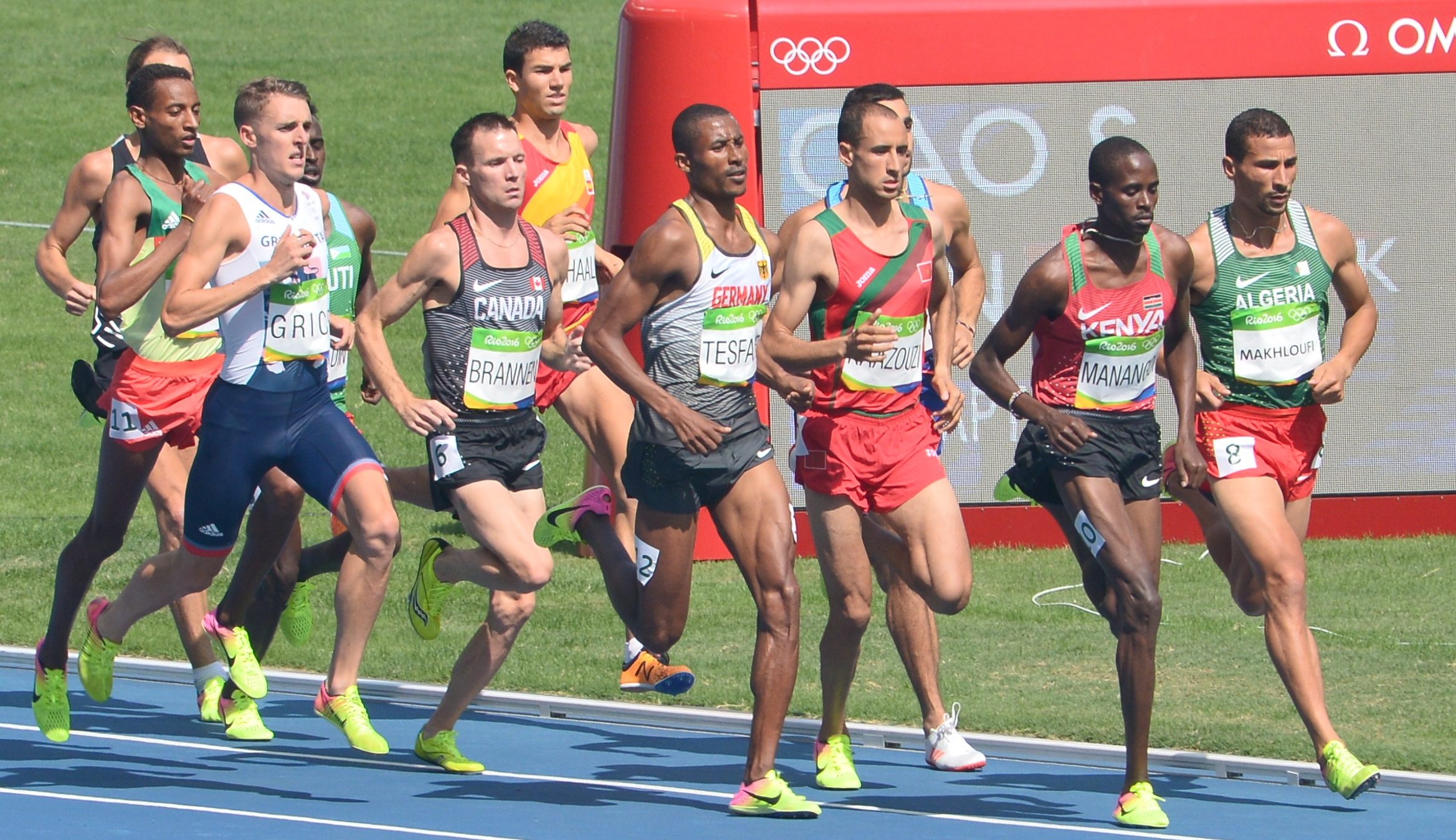 La série de Taoufik Makhloufi du 1500m des jeux olympiques de Rio 2016